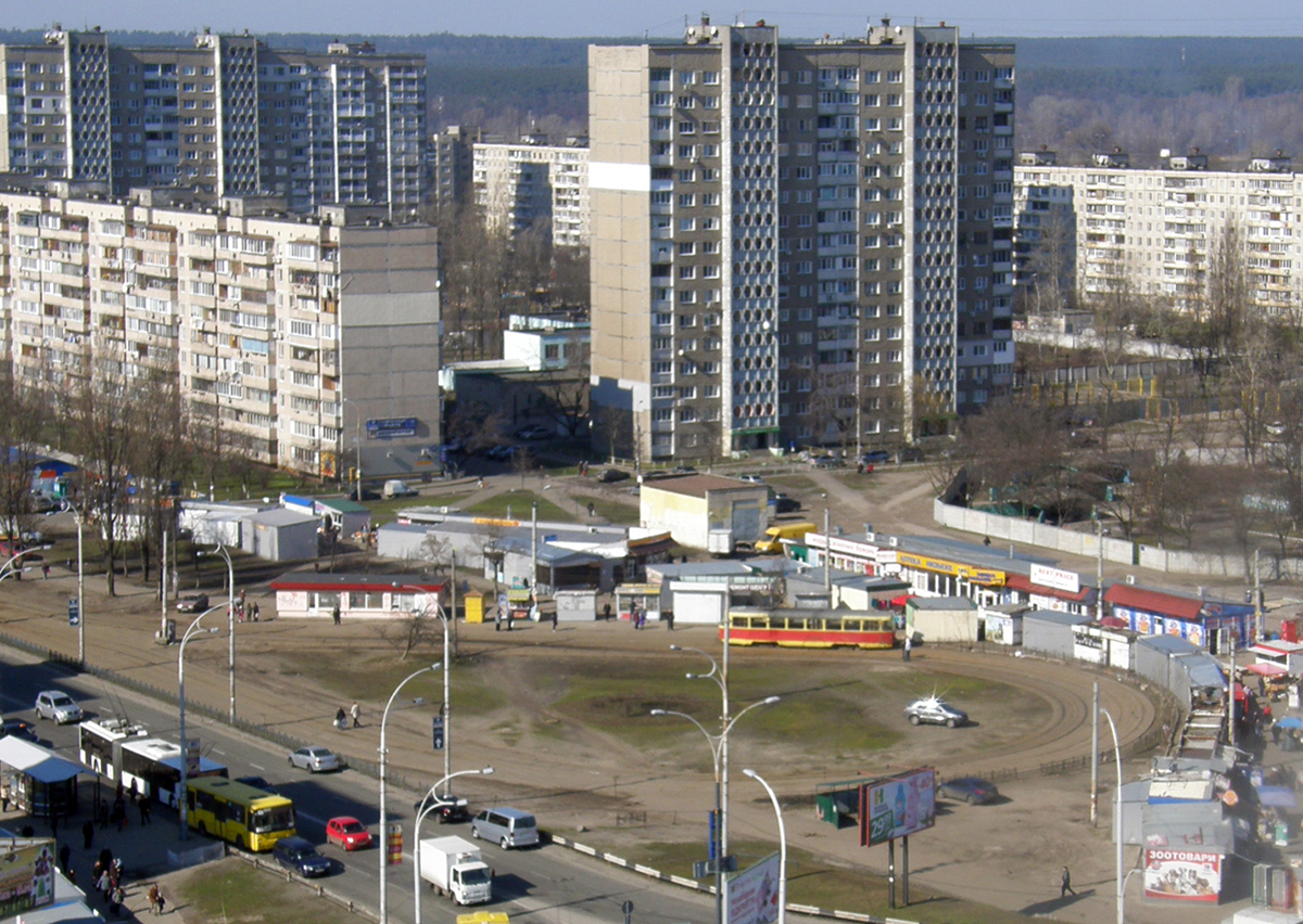 трамвайное кольцо Героев Днепра